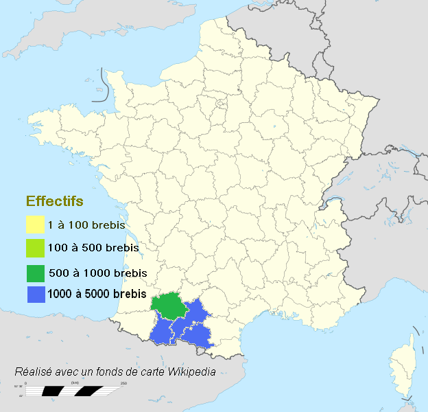 Répartition des brebis de race Tarasconnaise soumises au contrôle des performances en 2009 d'après les données fournies par l'Institut de l'Elevage (département Génétique)